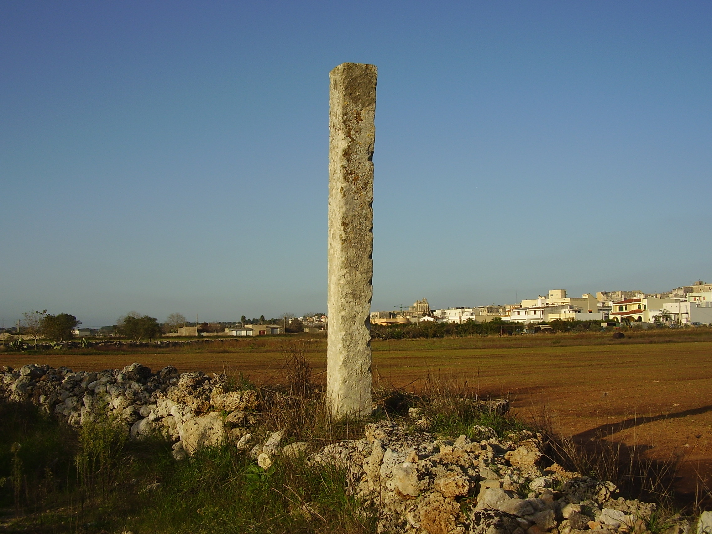 Menhir La Cupa1 Scorrano, Lecce